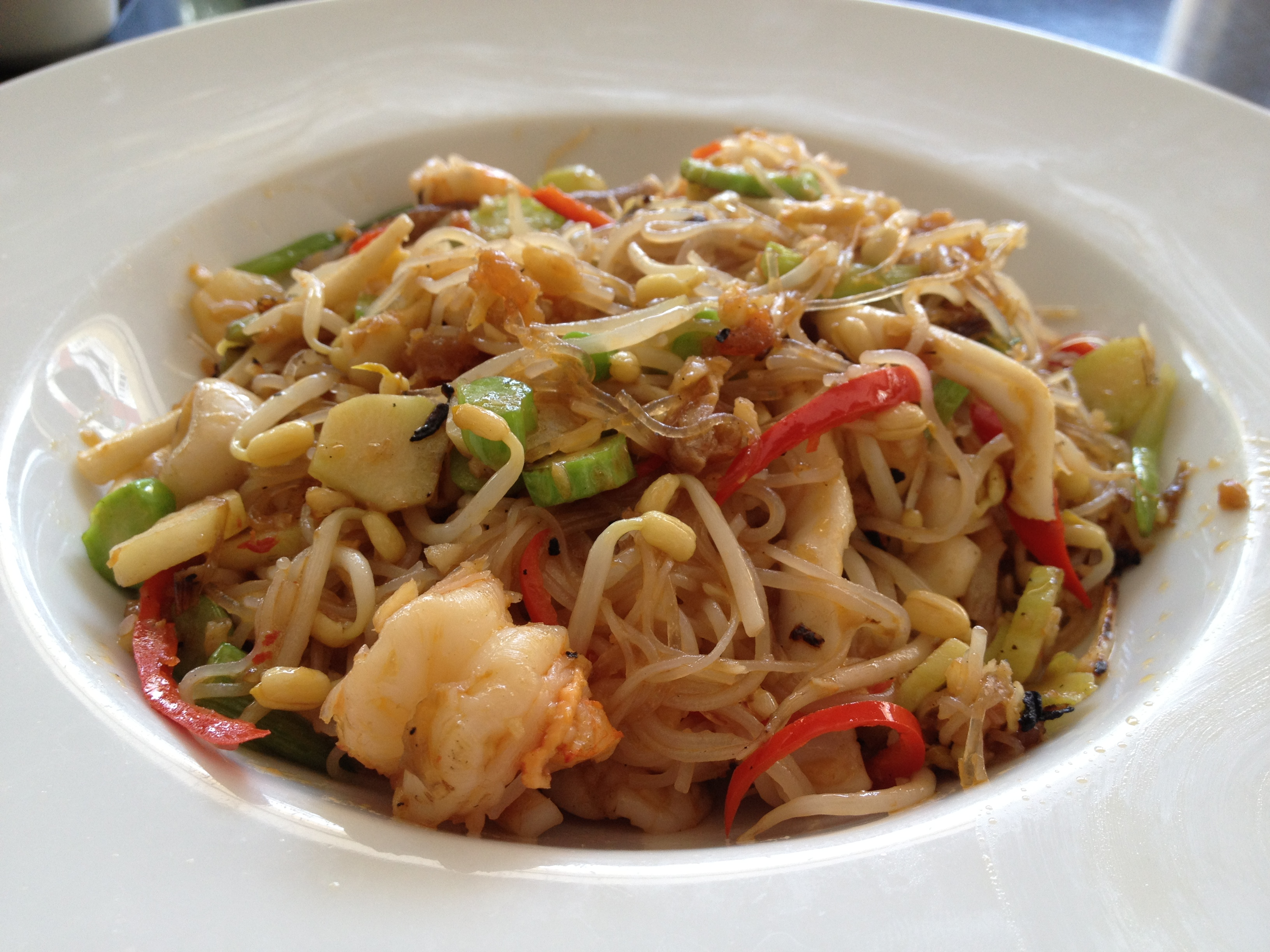 Phnom Penh, Cambodia.